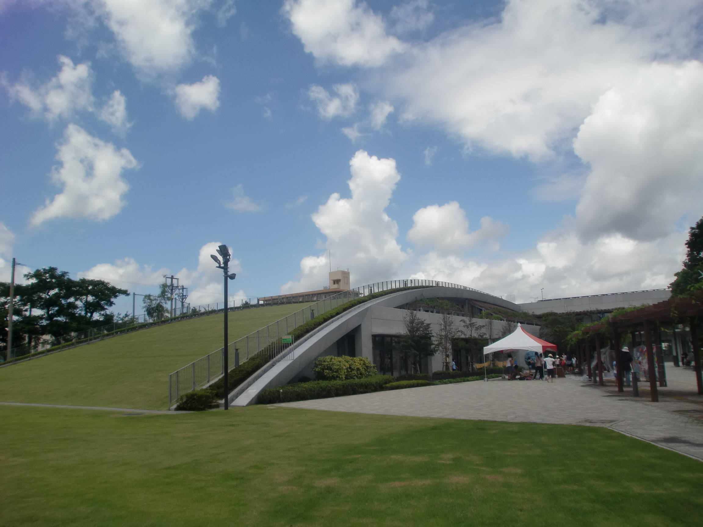 かごしま環境未来館の外観。